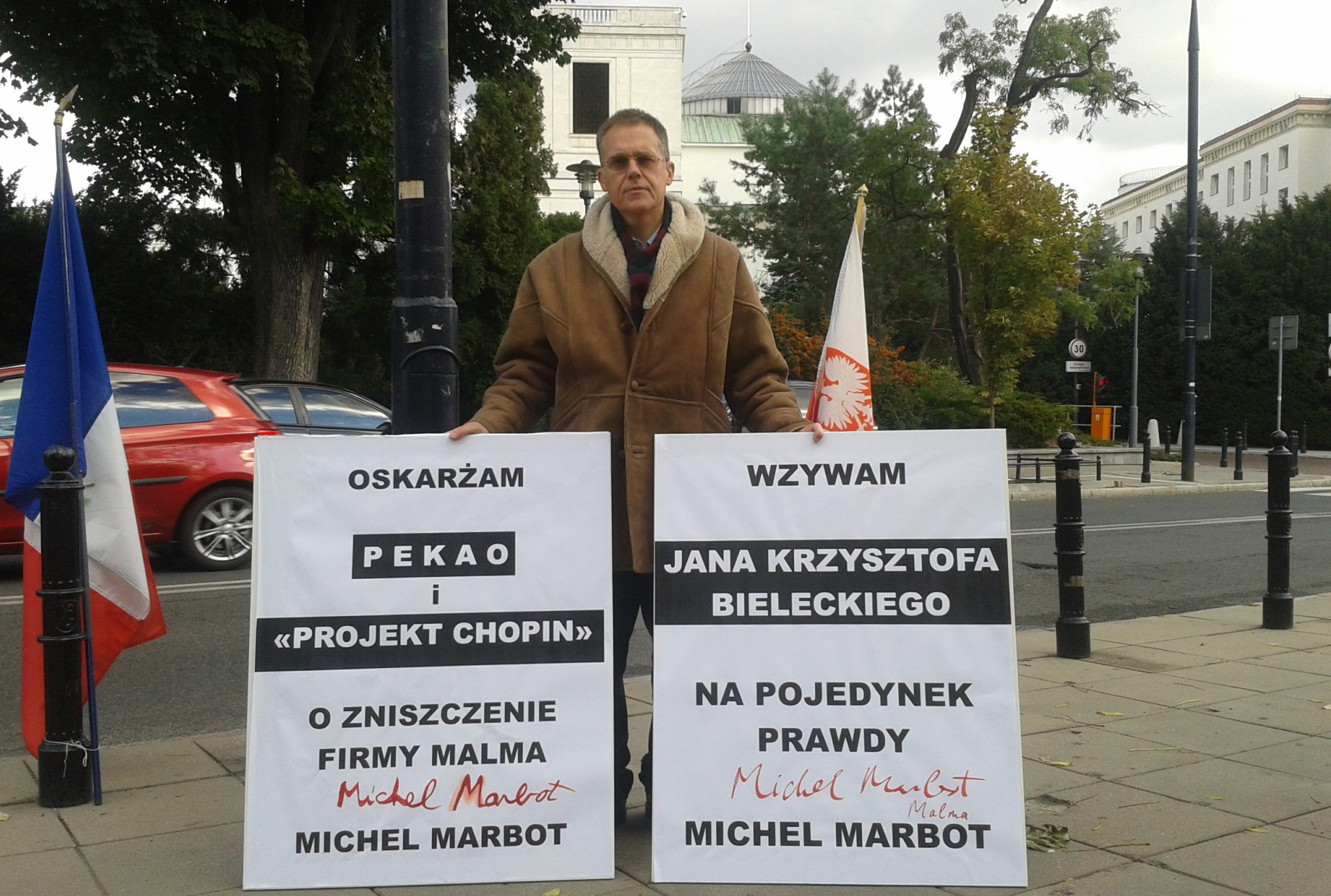 Założyciel Malmy głoduje pod Sejmem